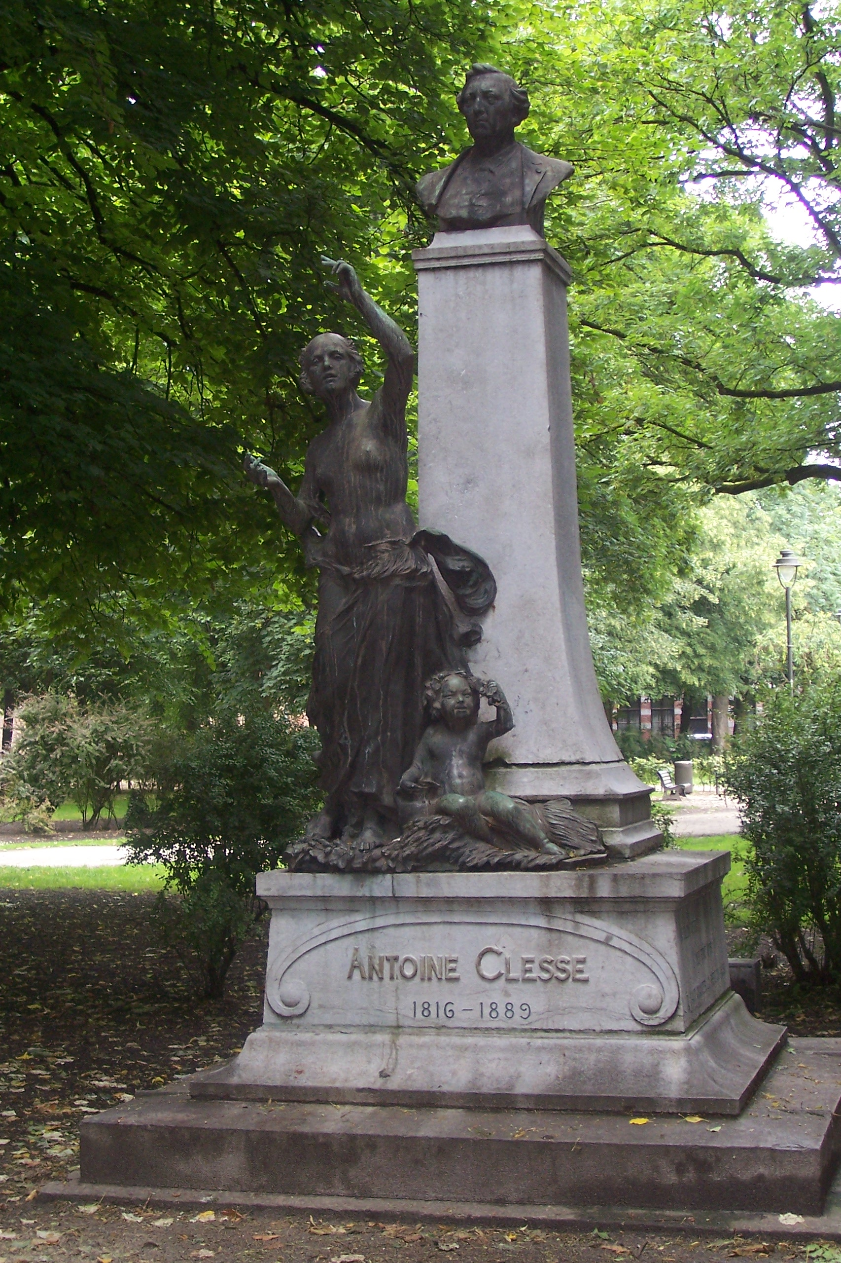 Description: Hommage à Antoine Clesse (1816-1889) Place du Parc sur le socle est écrit : Ce monument enlevé en 1918 par les allemands fut réédifié en 1932 par la ville de Mons, l'industrie de la brasserie et es amis. A plein verre, mes bons amis, il faut chanter la bière du pays ! Soyons unis !... flamands, wallons, ce ne sont là que des prénoms, belge est notre nom de famille ! Statue signée Paul Dubois